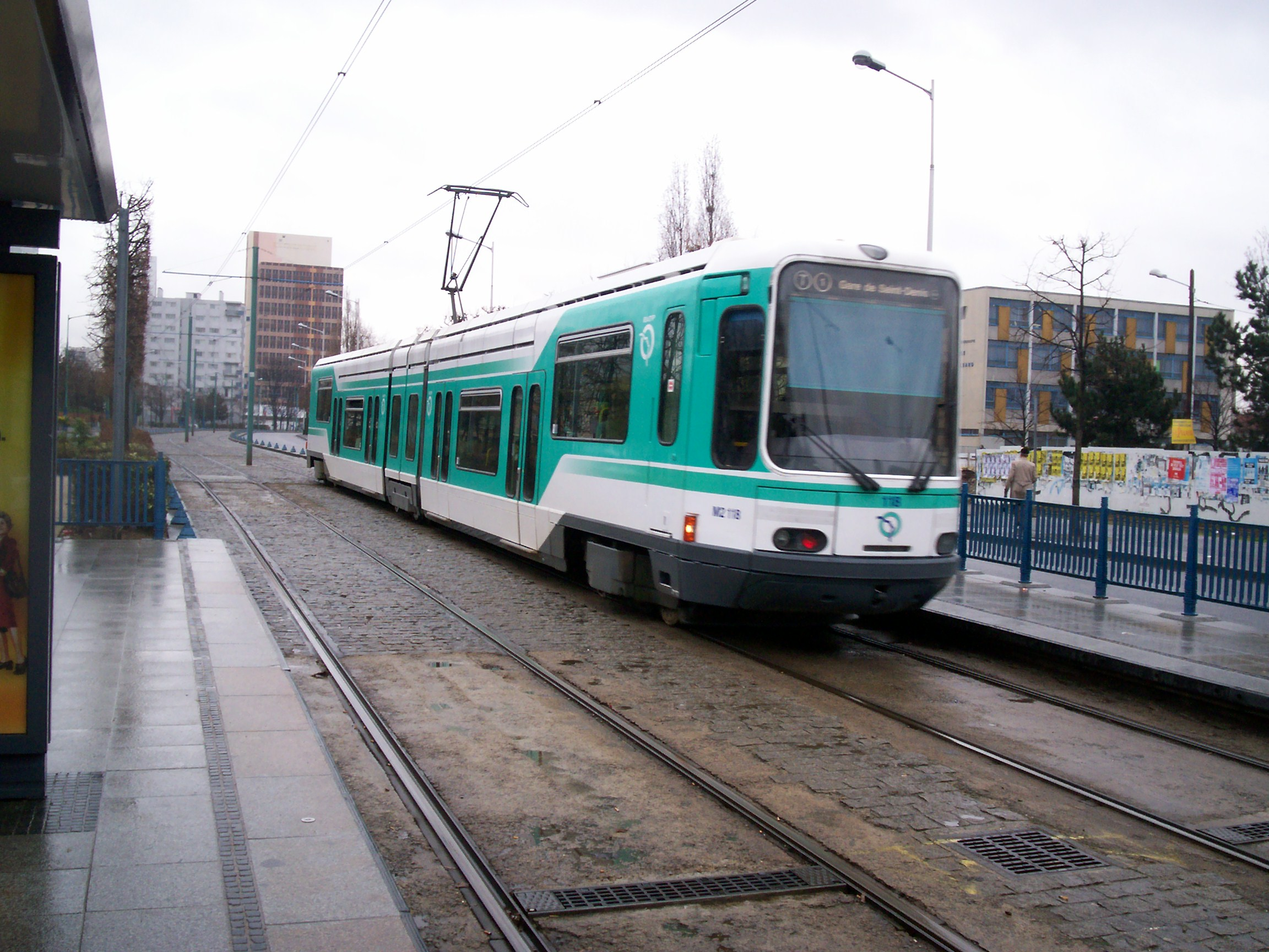 T1 à Cosmonautes